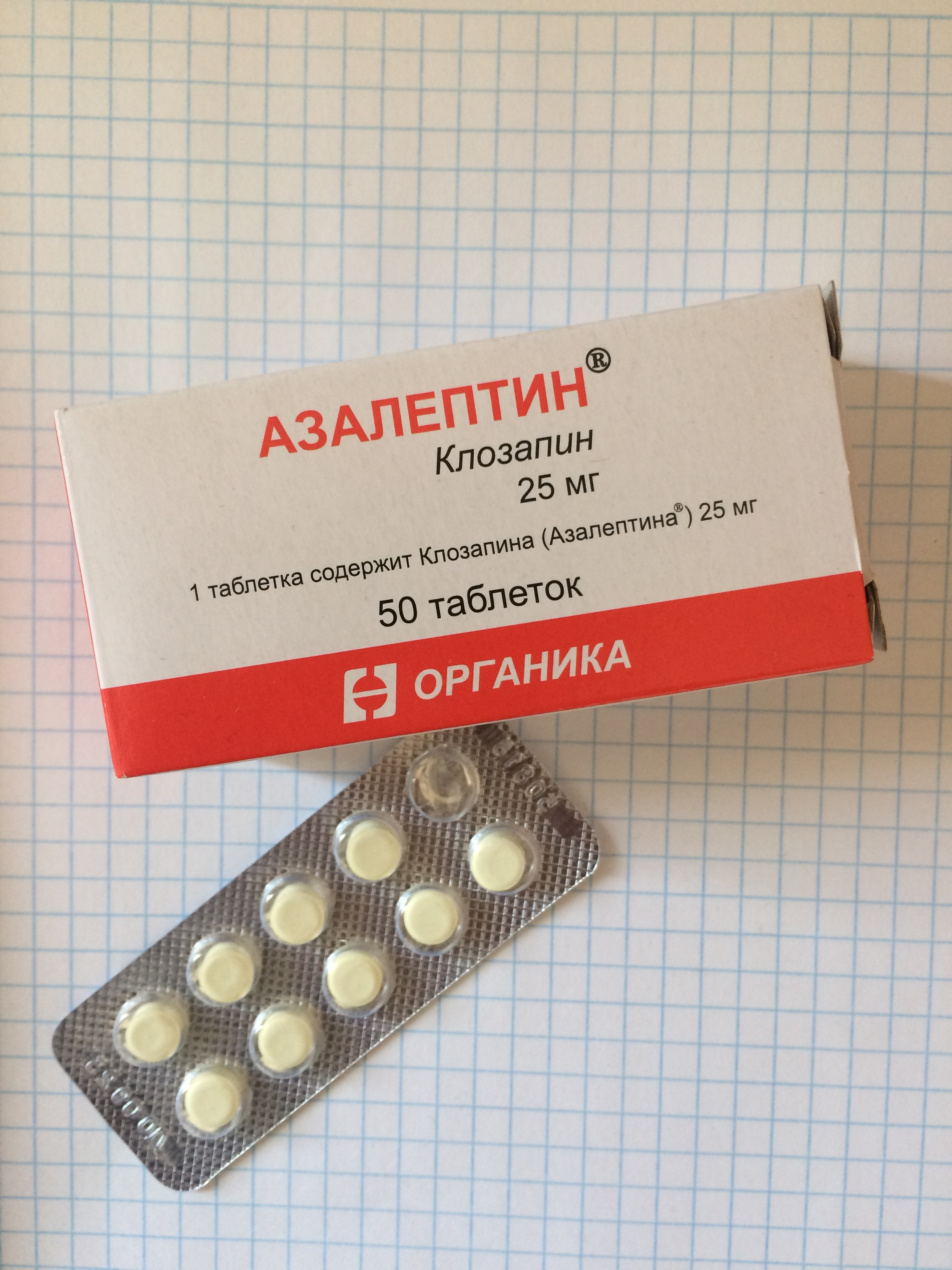 Азалептин 25мг пачка 50 таблеток